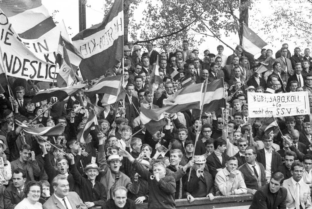 im Holsteinstadion. 15.500 Zuschauer sind im Stadion.